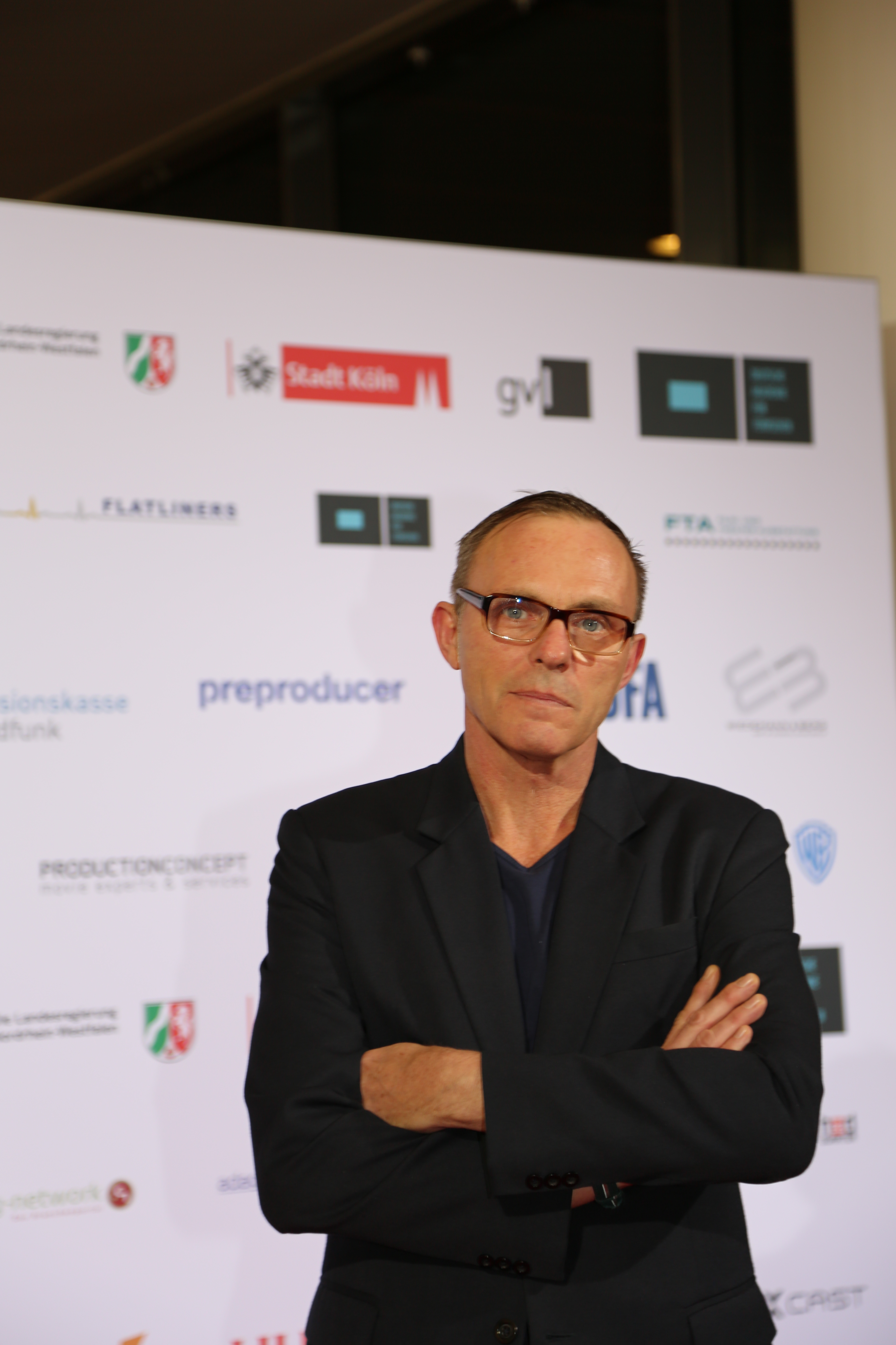 Dirk Martens bei der Verleihung der Auszeichnungen der Deutschen Akademie für Fernsehen (DAFF) 2017.